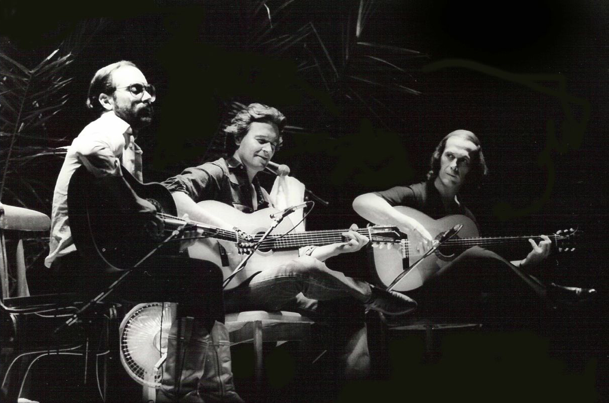 Photographer: F. Antolín Hernandez Para Nunca Jamás John McLaughlin, Al Di Meola, and Paco de Lucía Recuerda: lo importante es transmitir sentimientos. Al Di Meola,John Mclaughlin y Paco de Lucía (de izquierda a derecha) dieron uno de sus primeros conciertos juntos en Barcelona en la década de los 80. Los dos primeros son unos virtuosos de la guitarra, su técnica es impecable, pero fríos como el hielo, nada que ver con la pasión y el sentimiento de Paco de Lucía. Camara: Olympus OM2 Objetivo: OM 135mm 2.8